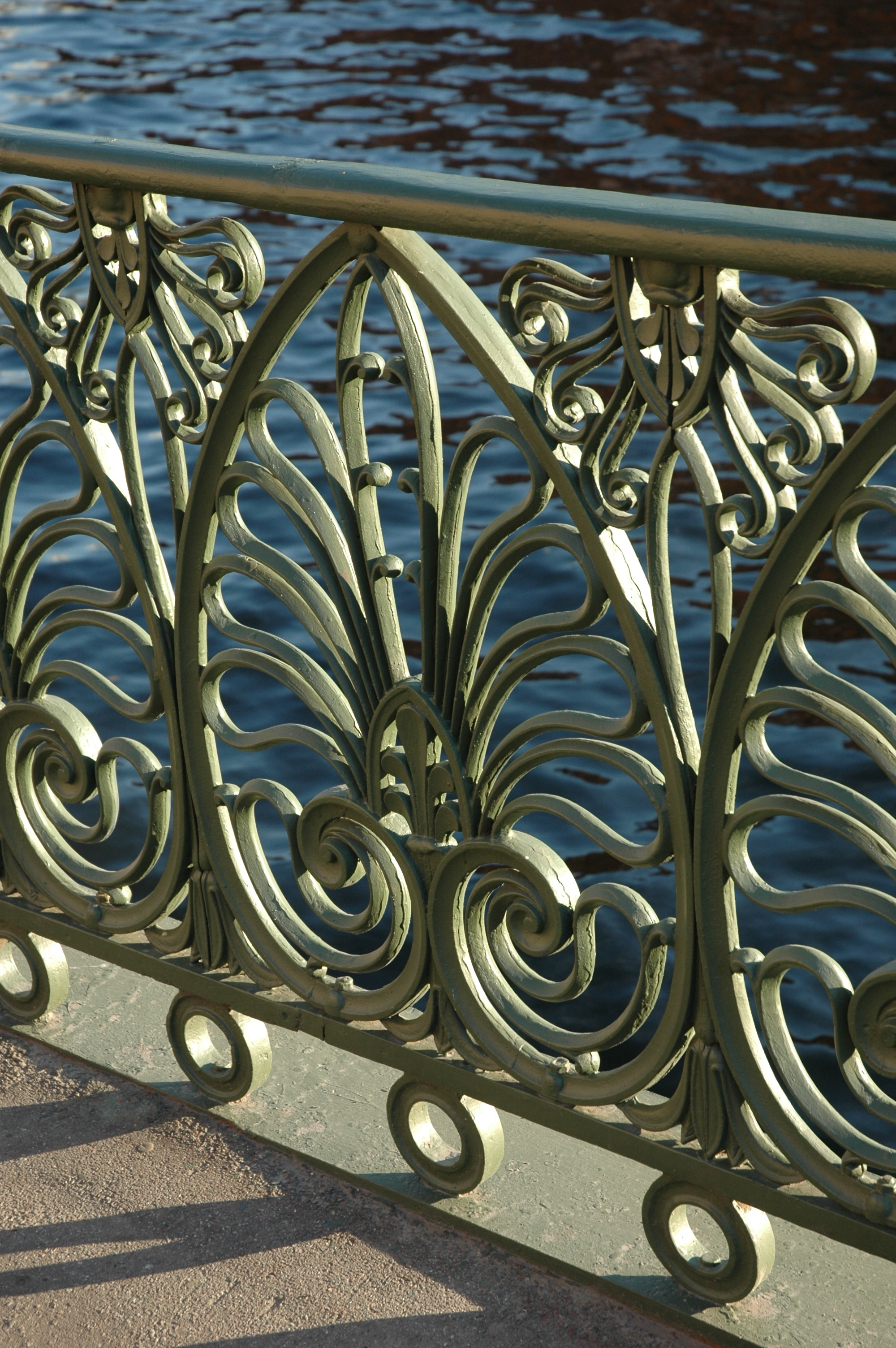 Demidov bridge (fence), Griboedova canal (St Petersburg)